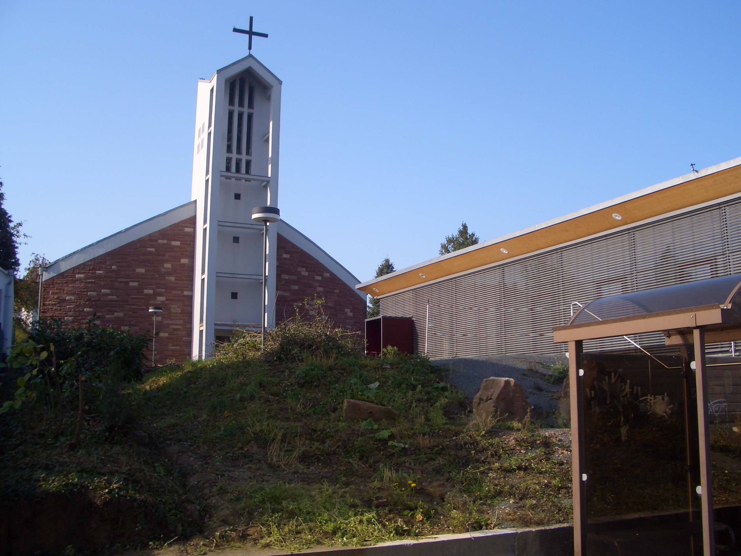 Katolische Kirche in Otzberg-Lengfeld